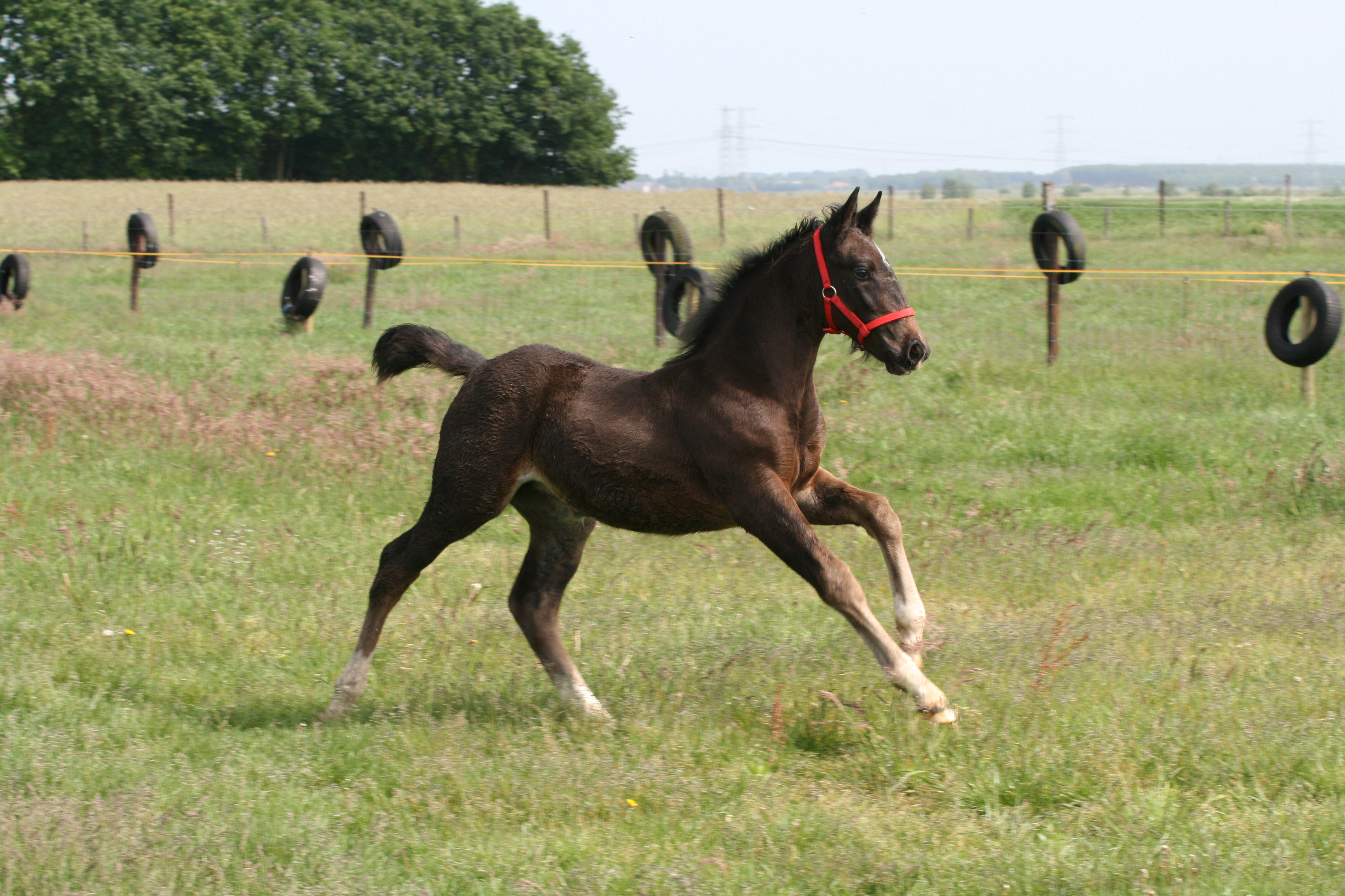 Santana Sundancer